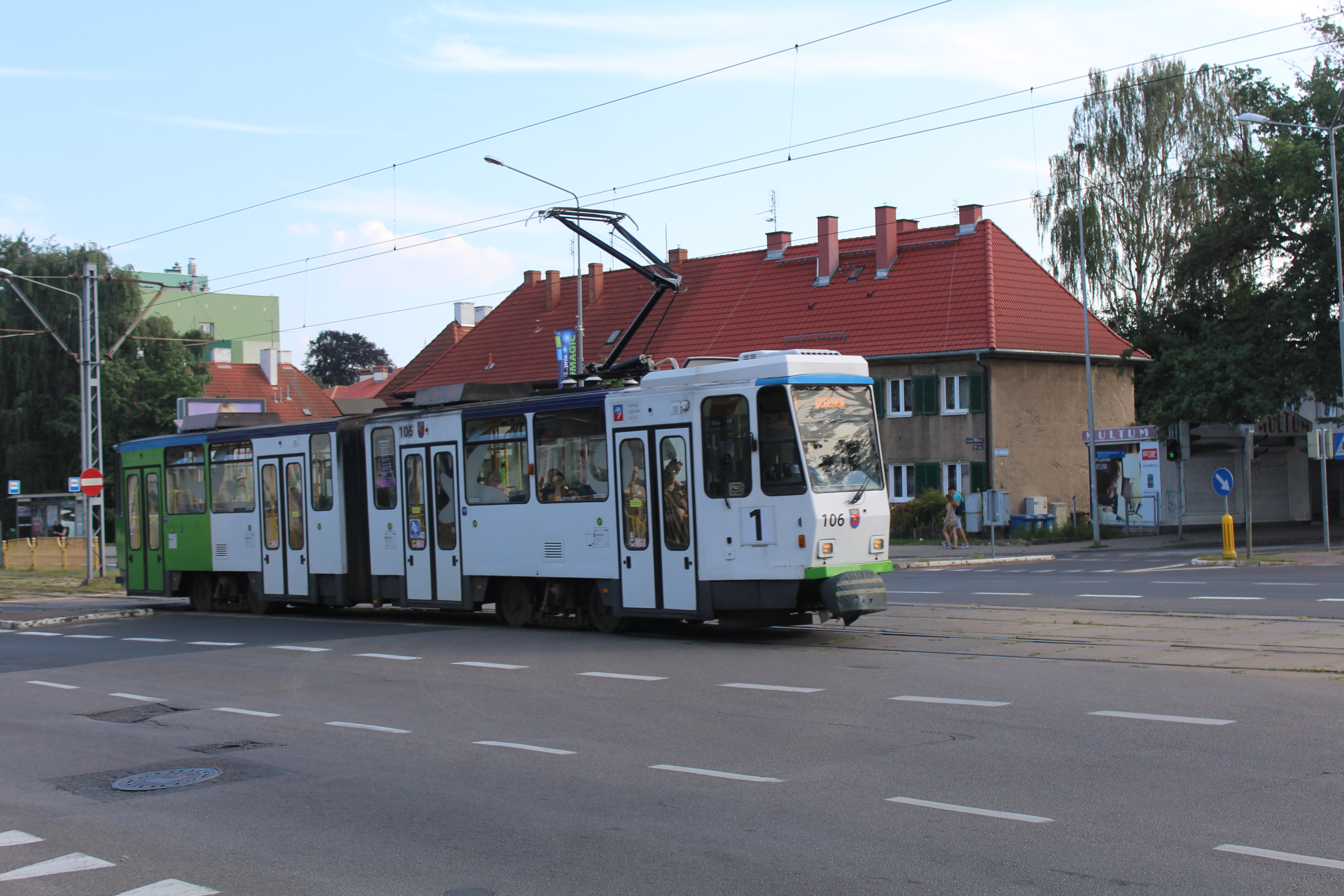 Tatra KT4DtM w Szczecinie, 2016 r.